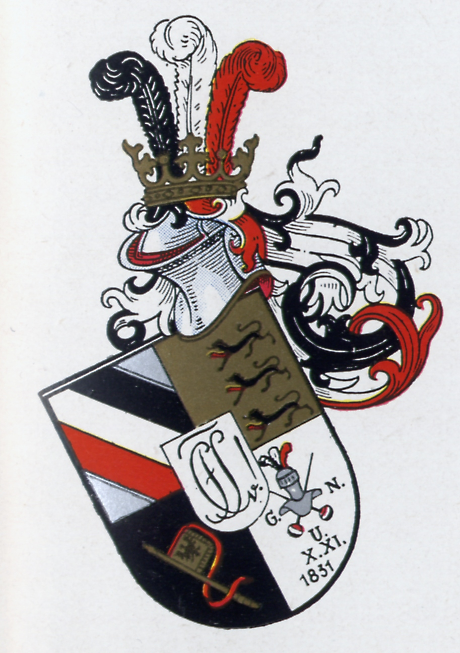 Wappen des Corps Suevia Tübingen